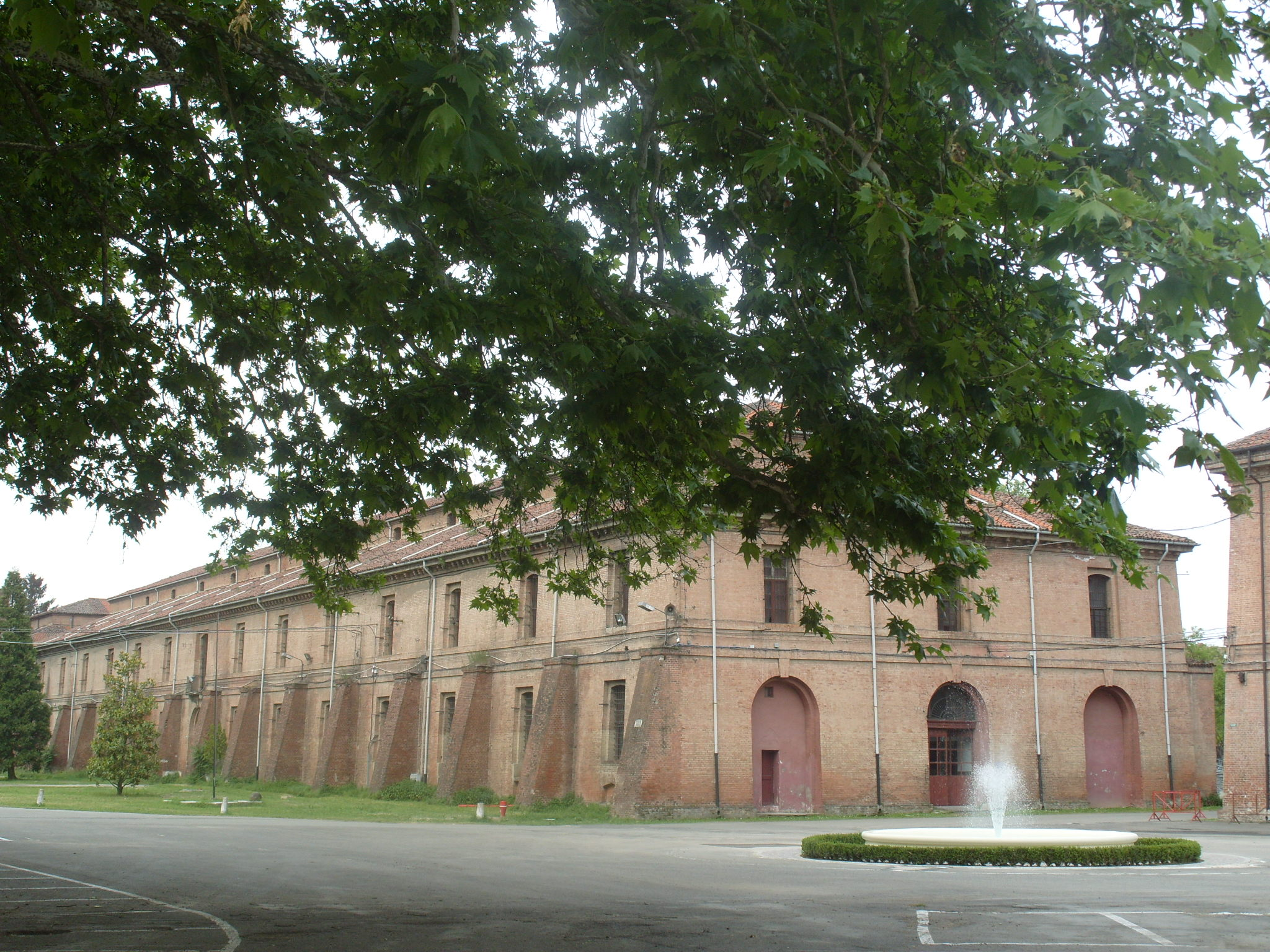 La Salle d'Artifice (Armeria). Particolare dell'ingresso della porta reale con la meccanica del ponte levatoio. La Cittadella di Alessandria costituisce uno dei più grandiosi monumenti europei nell’àmbito della fortificazione permanente del XVIII secolo, uno dei pochi ancora esistenti in Europa. È l’unica fortezza europea ancora oggi inserita nel suo contesto ambientale originario: non esiste uno schermo di case che chiude la visuale dei bastioni, o una strada ad alta percorrenza a circondare i fossati. Tra le meglio conservate d'Italia, sorge sulla sponda sinistra del fiume Tanaro, nel comune di Alessandria. Dal 2006 la cittadella (già monumento nazionale) è stata inserita nella "Tentative List" per la candidatura alla Lista del Patrimonio Mondiale dell'Umanità UNESCO. Sui bastioni della cittadella venne innalzato il 10 marzo 1821, per la prima volta nella storia d'Italia, il vessillo tricolore da parte del congiurato colonnello Ansaldi.